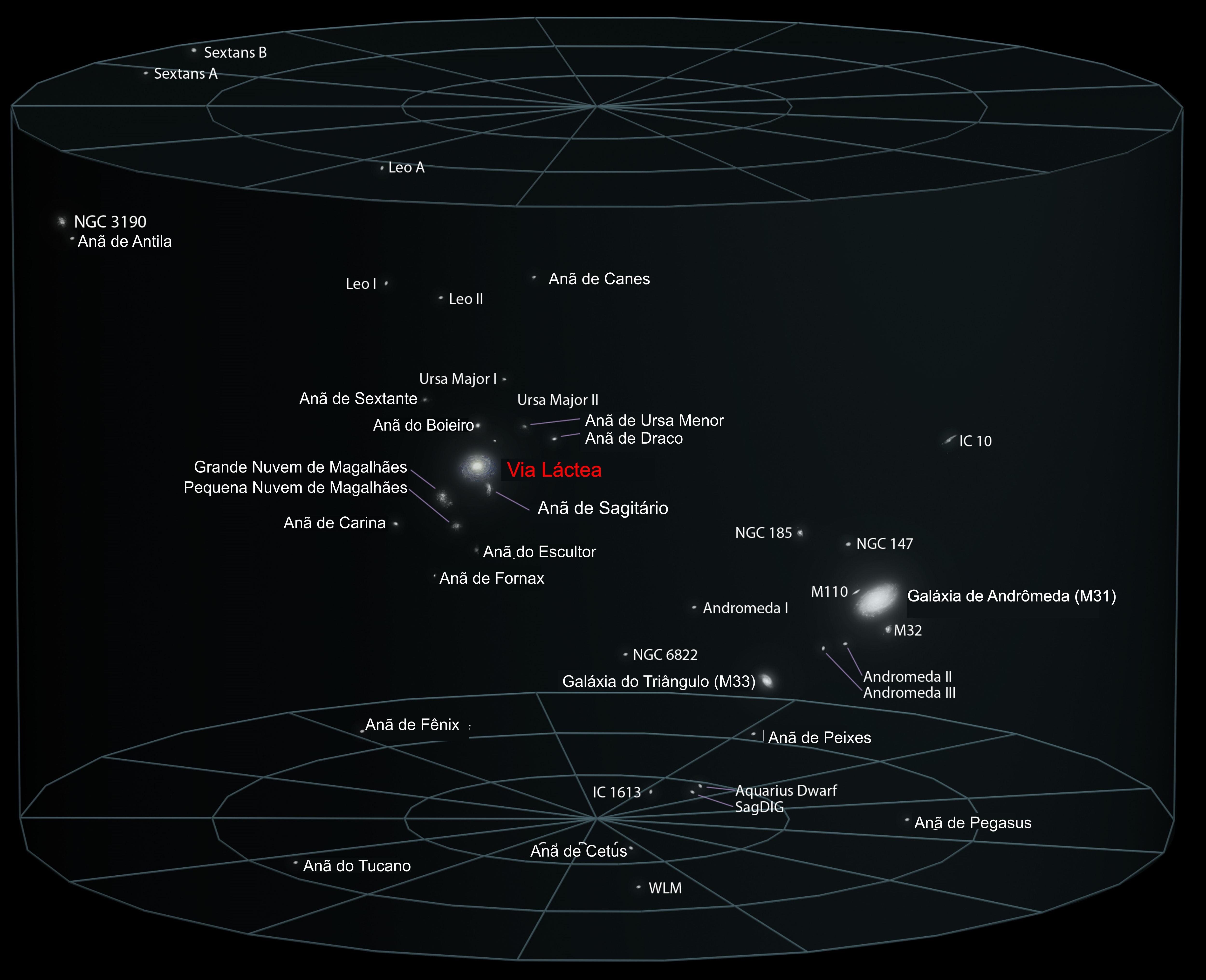 Ilustração da localização dos componentes do Grupo Local, do qual a Via Láctea faz parte.